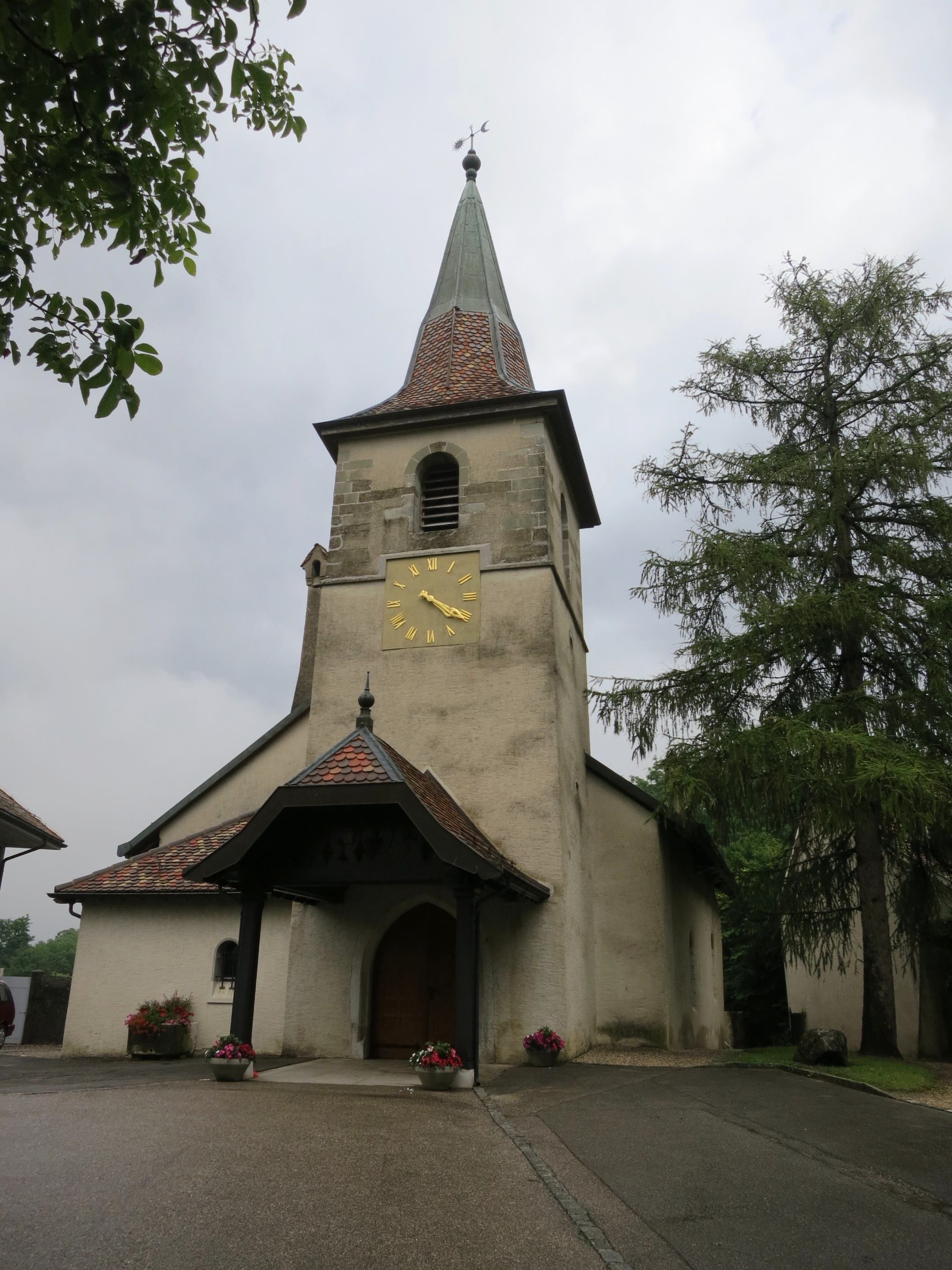 Kirche, Gingins VD, Schweiz